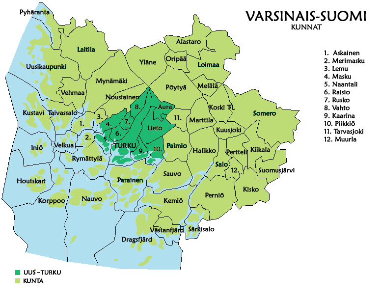 Turku